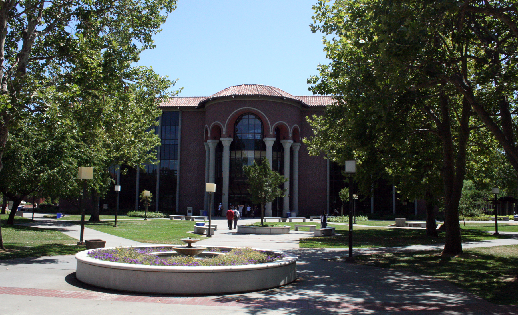 sacramento city college